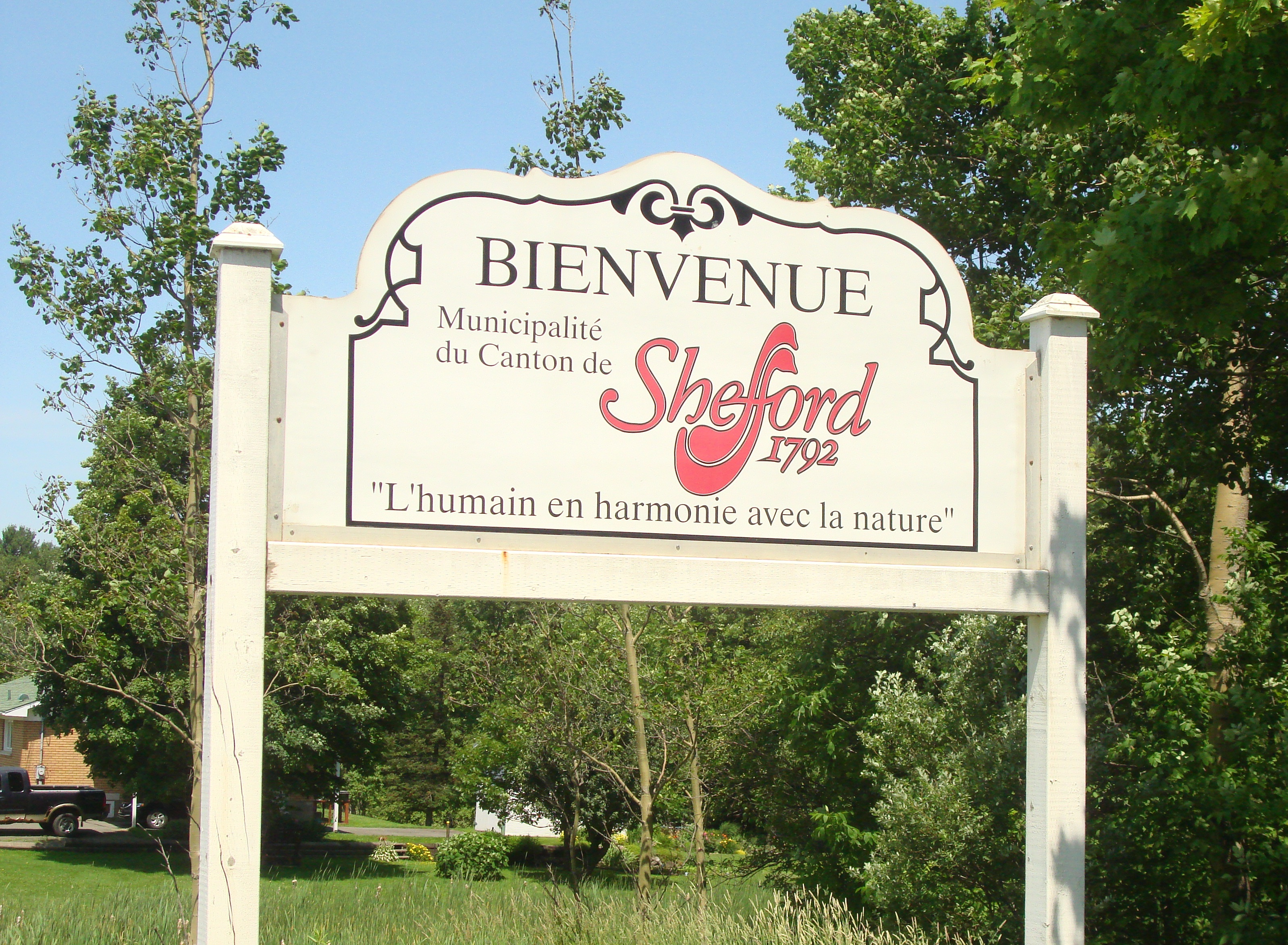 Bienvenue au canton de Shefford